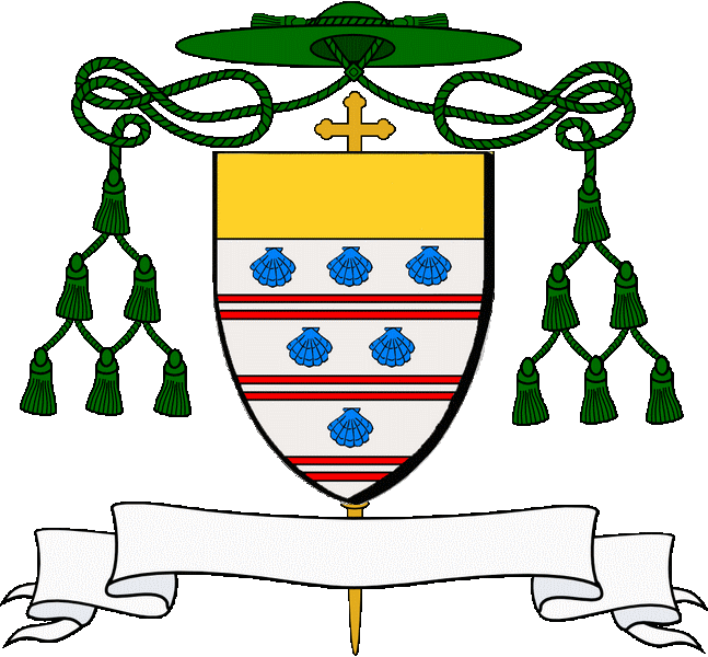 En arc'hant e deir eilenn treustellet en gwad, heuliet gant c'hwec'h kregilhenn en glazur, 3, 2, 1; e gab en aour